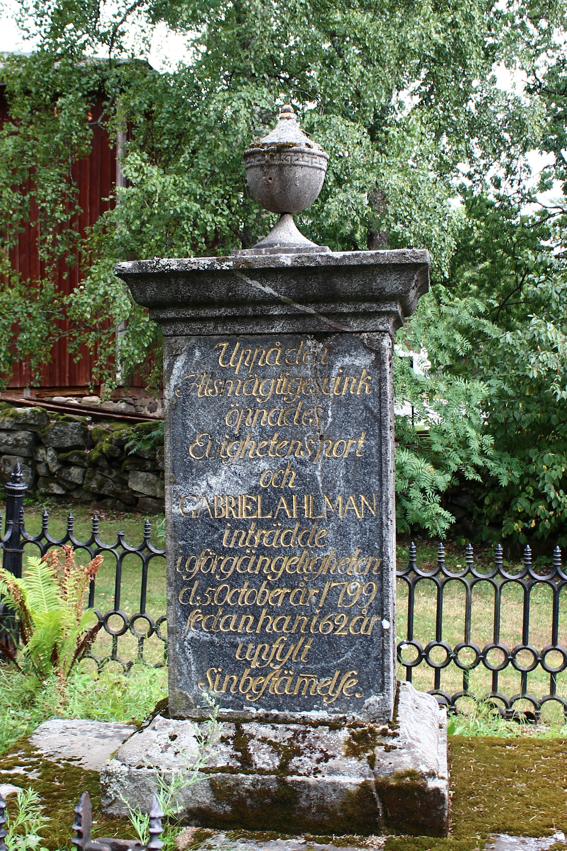 Gabriel Ahlmanin hautamuistomerkki, etupuoli. Kiveen kirjoitettu teksti on seuraava: "Uppå den Alsmägtiges vink öpnades Evighetens port och GABRIEL AHLMAN inträdde i oförgängeligheten d: 5. October år 1799 fedan han i 62 år upfylt Sin bestämmlse."